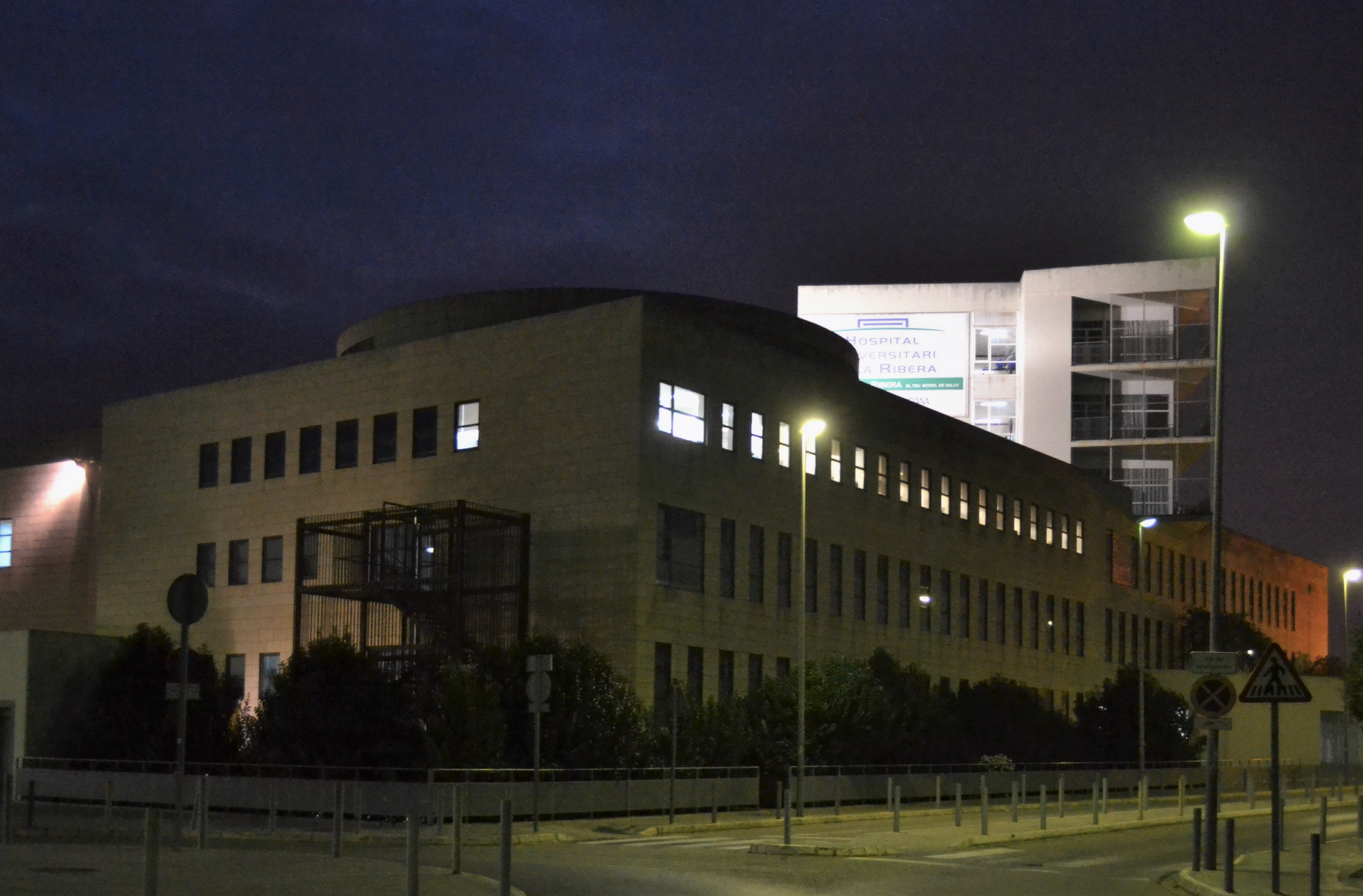 Hospital de la Ribera de nit, Alzira.